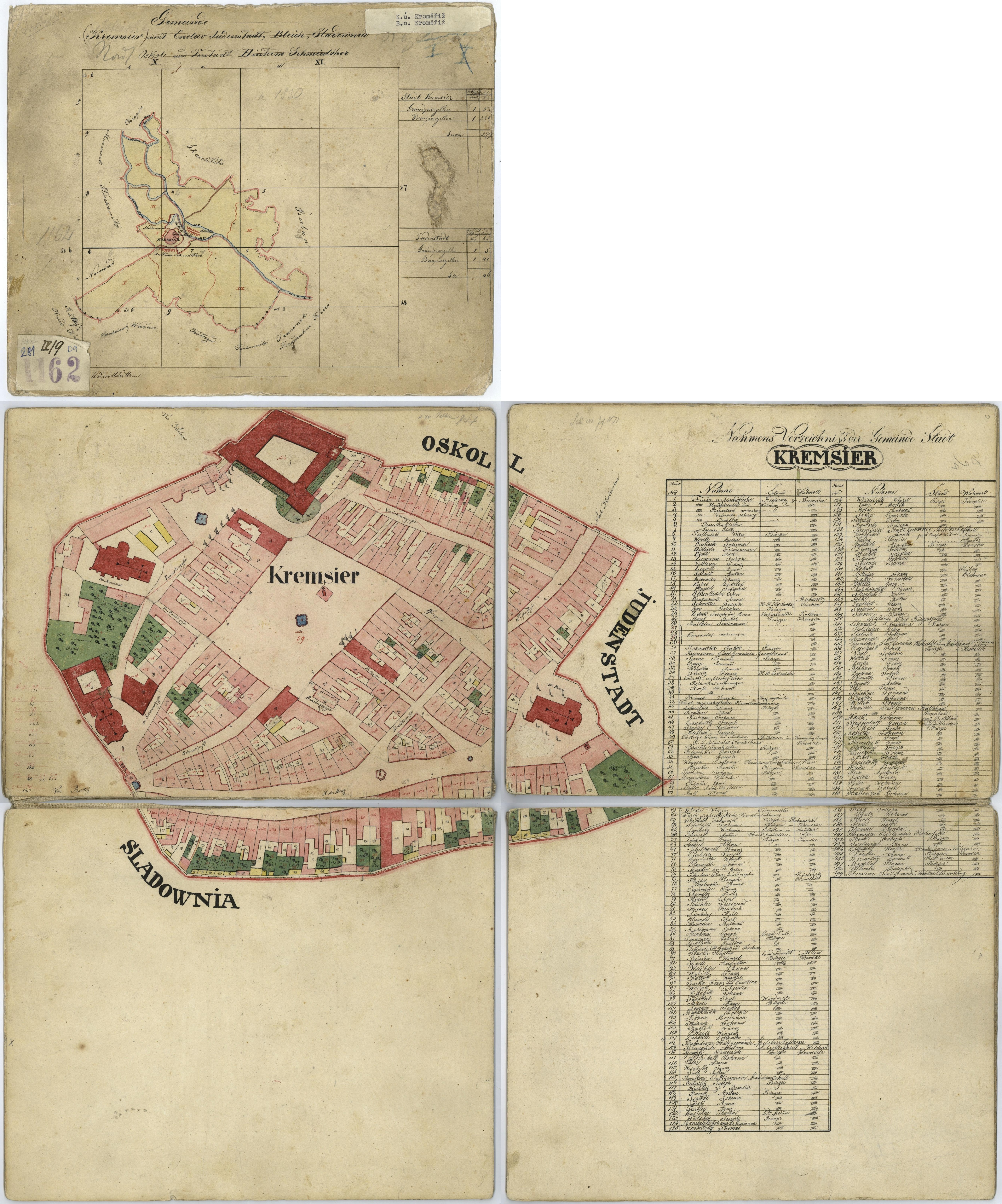 Indikationsskizzen: Kroměříž